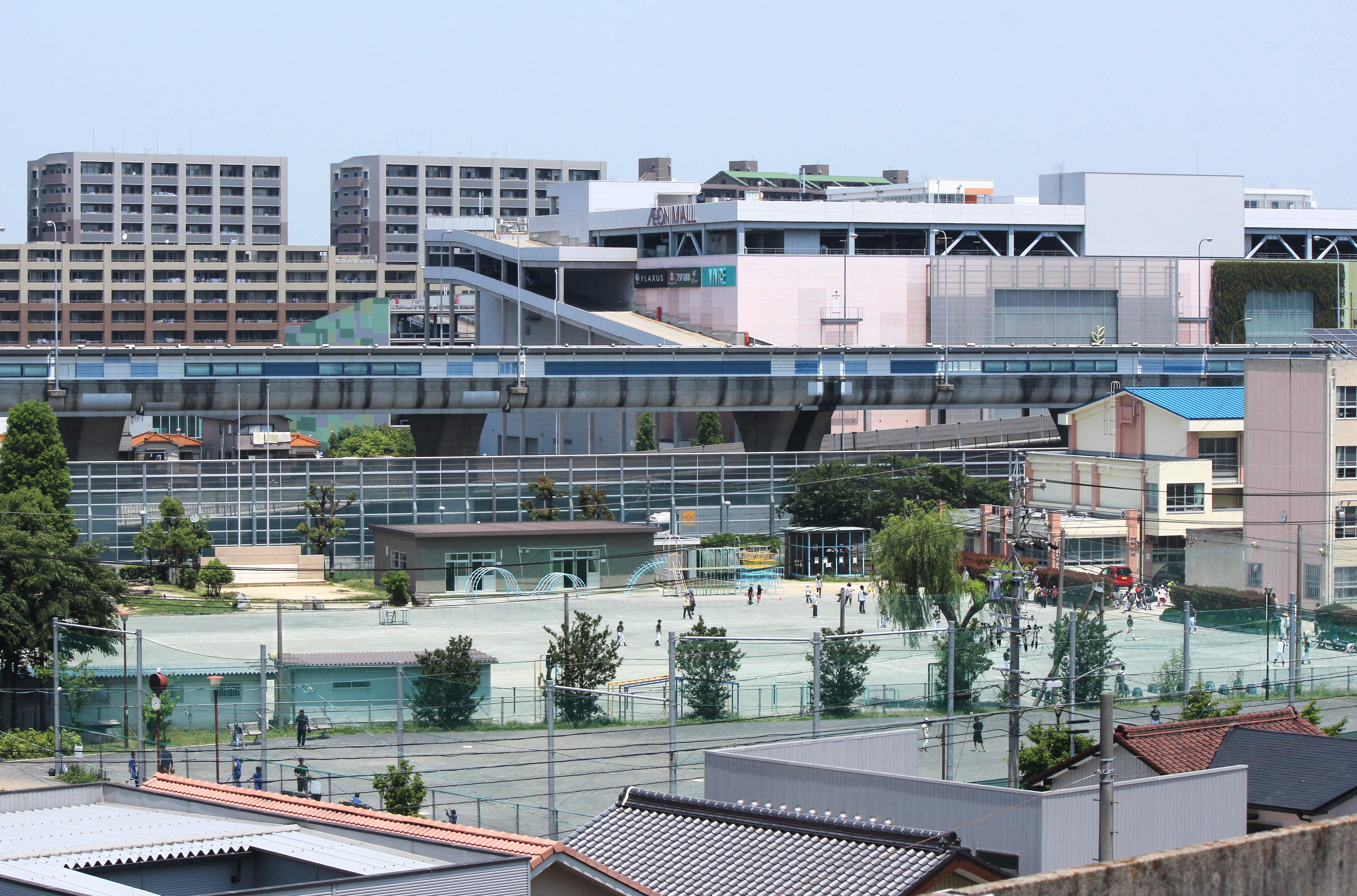 名古屋第二環状自動車道 山田西IC - 平田IC間